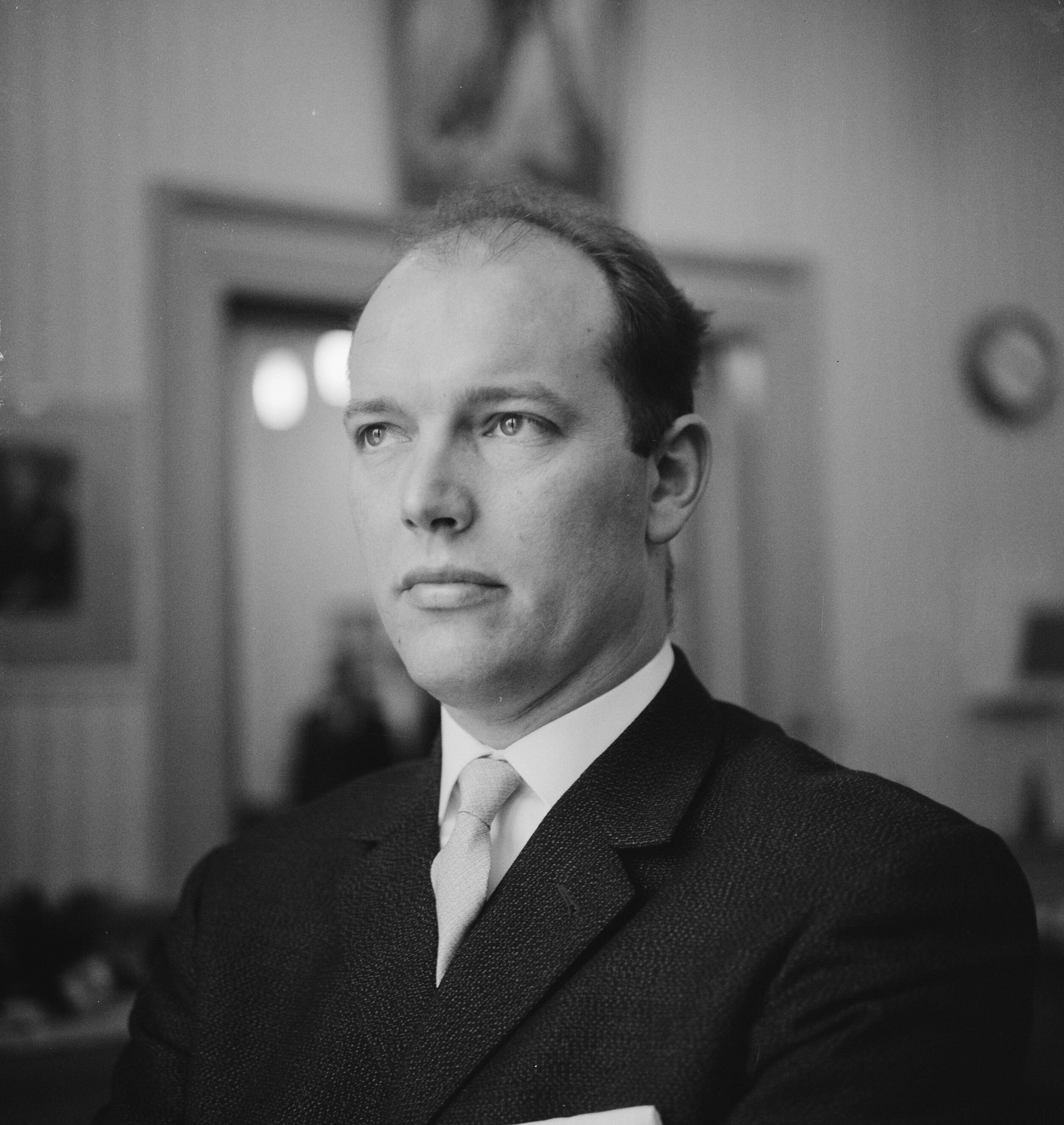 Collectie / Archief : Fotocollectie Anefo Reportage / Serie : [ onbekend ] Beschrijving : Joop van Zon (kop) dirigent Datum : 24 december 1964 Trefwoorden : dirigenten Fotograaf : Nijs, Jac. de / Anefo Auteursrechthebbende : Nationaal Archief Materiaalsoort : Negatief (zwart/wit) Nummer archiefinventaris : bekijk toegang 2.24.01.03 Bestanddeelnummer : 917-2747